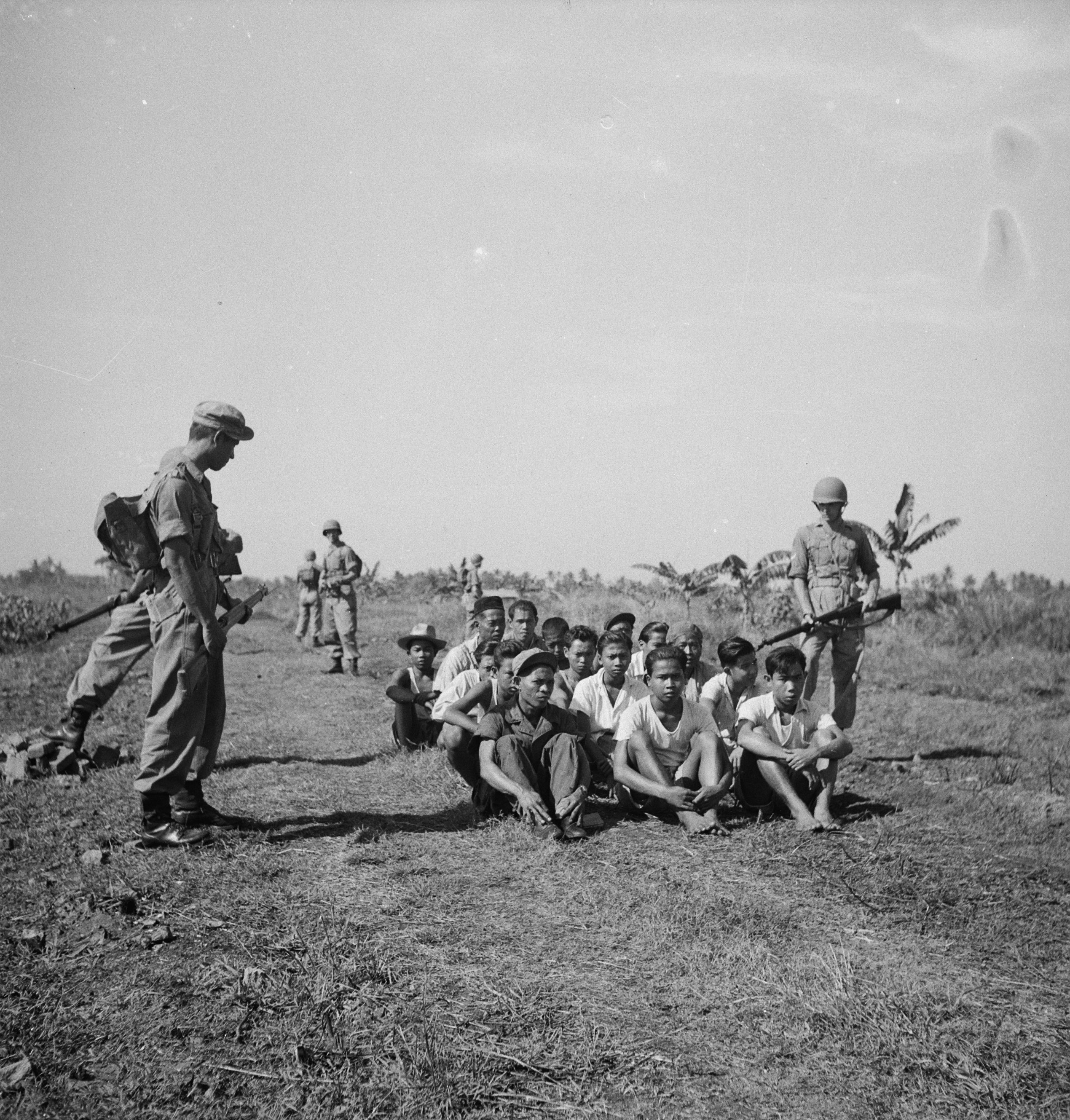 Collectie / Archief : Fotocollectie Dienst voor Legercontacten Indonesië Reportage / Serie : [DLC] V.P.T.L. Beschrijving : [een groep gevangenen zit op de grond, bewaakt door soldaten] [voorbeeld van goed toezicht] Annotatie : V.P.T.L. = Voorschrift voor de uitoefening van de Politiek-Politionele Taak van het Leger (optreden tegen guerillastrijders). Dit voorschrift van het KNIL dateert al uit 1928, verscheen in 1936 en is gewijzigd en aangevuld in 1945 en in 1946 nog een keer uitgegeven, nu speciaal voor de KL. De fotoserie werd gebruikt voor de brochure "Kennis van het V.P.T.L., een kwestie van leven of dood / Mengetahoei akan V.P.T.L., soal hidoep atau mati" [DjK] Datum : 1946 Locatie : Indonesië, Nederlands-Indië Fotograaf : Fotograaf Onbekend / DLC Auteursrechthebbende : Nationaal Archief Materiaalsoort : Negatief (zwart/wit) Nummer archiefinventaris : bekijk toegang 2.24.04.03 Bestanddeelnummer : 15865